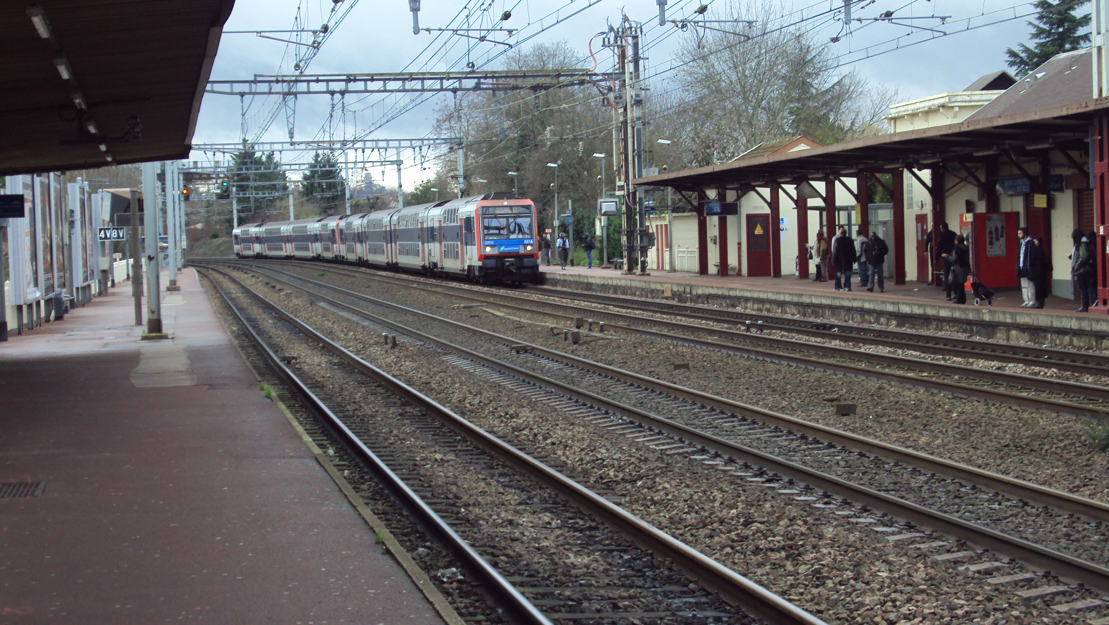 Z 20900 arrivant en gare de Sainte-Geneviève-des-Bois (Essonne, Île-de-France, France).